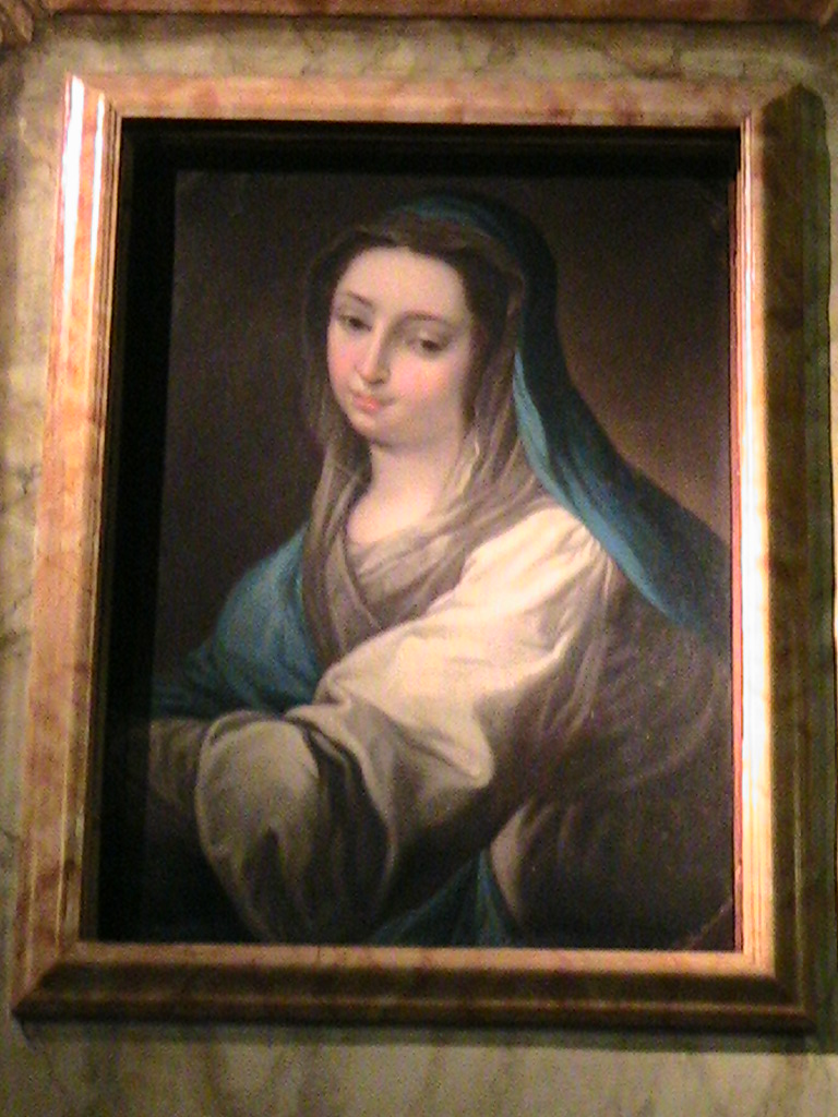 Bardi - Chiesa parrocchiale Beata Maria Vergine Addolorata - Busto della Vergine, di Francesco Nuvolone detto il Panfilo (XVII sec)